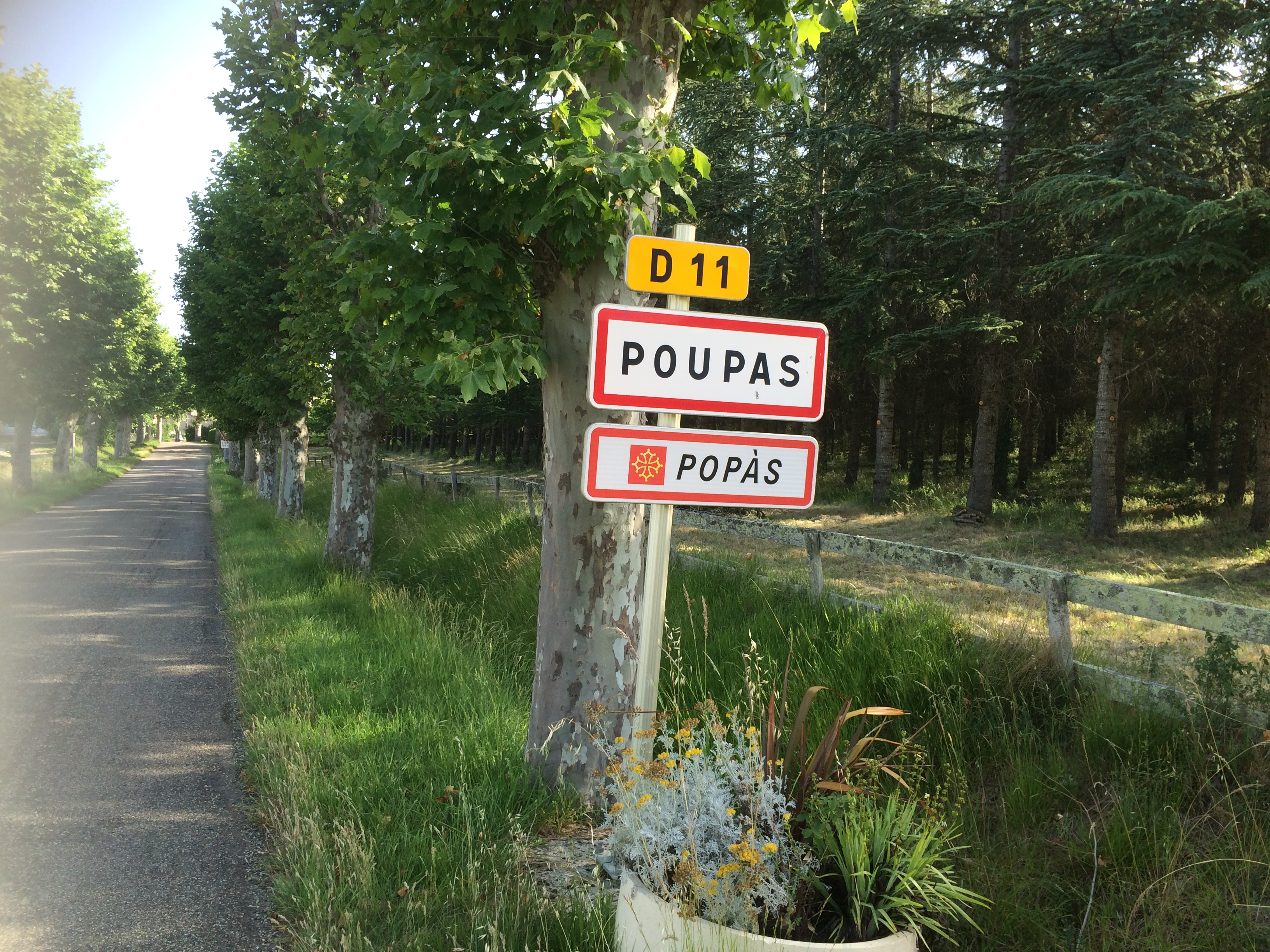 Panneaux routiers de signalisation Entrée dans Poupas en deux langues, français et occitan